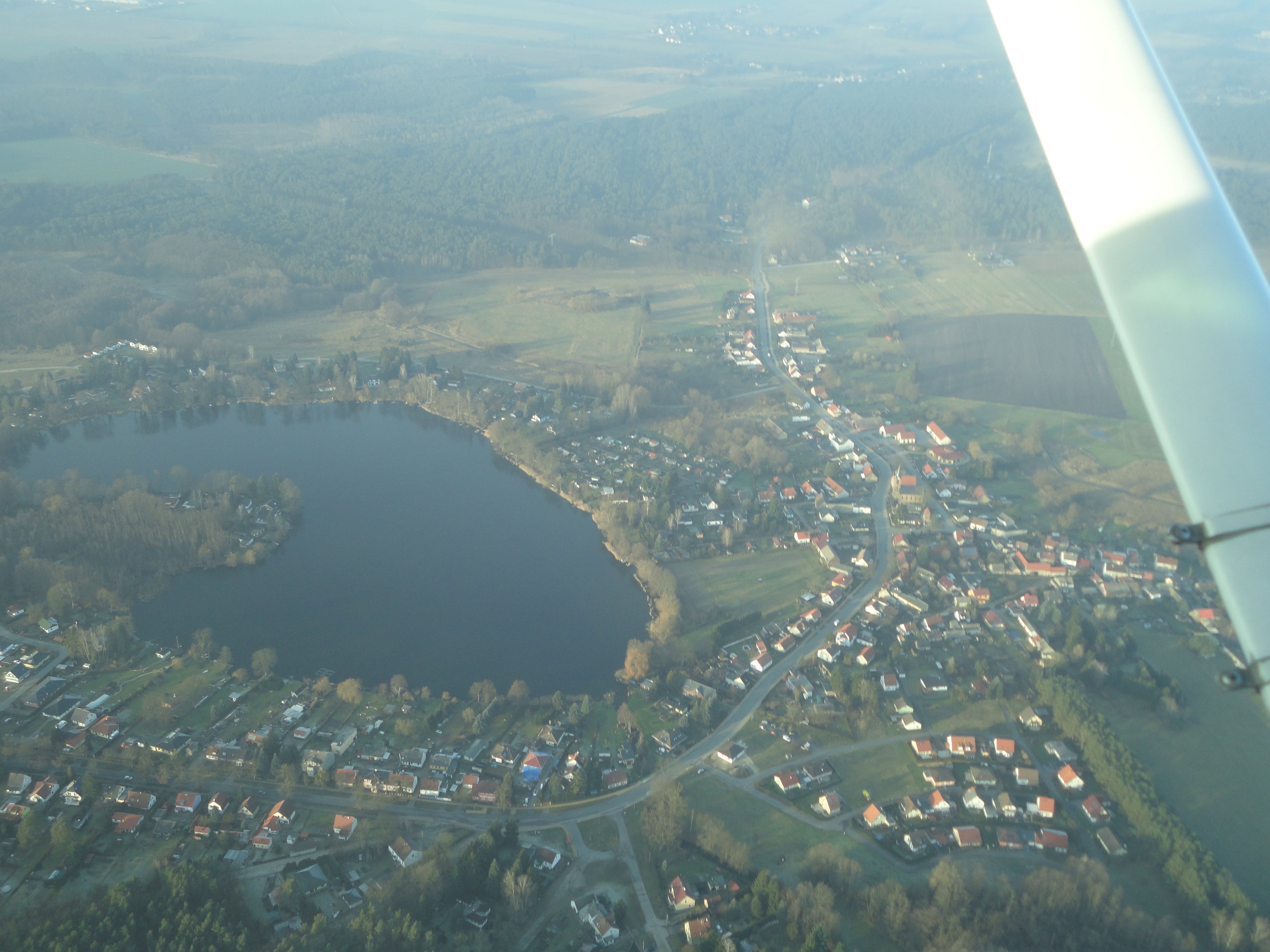 Kagel aus der Luft